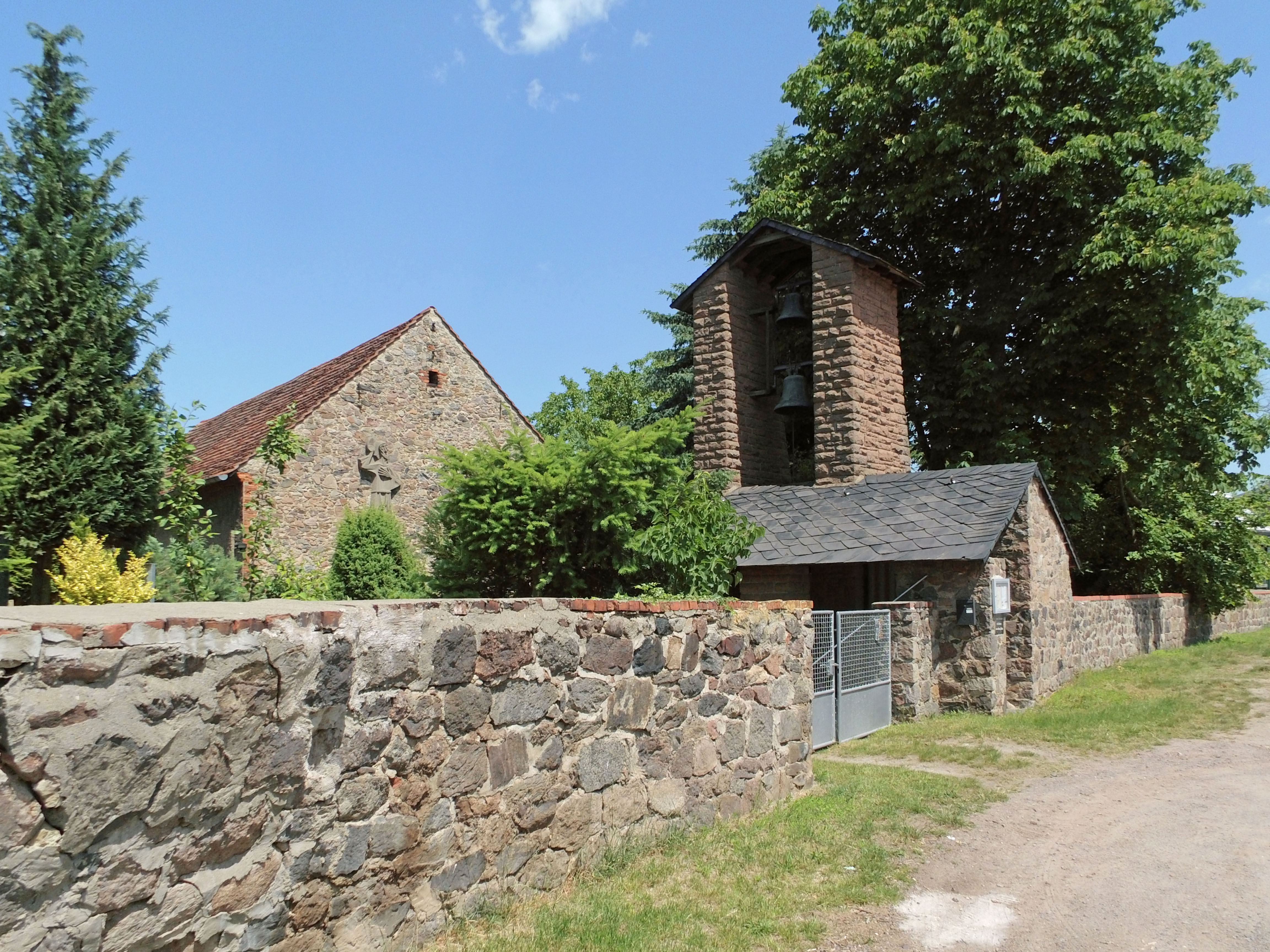 Katholische Kirche St. Nikolaus von der Flüe in Colbitz (Sachsen-Anhalt)